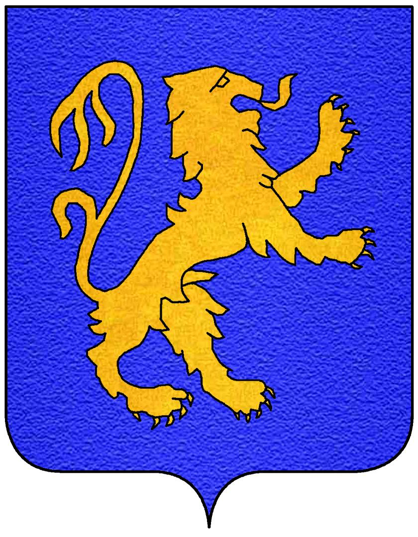 Stemma della famiglia Catalano Gonzaga